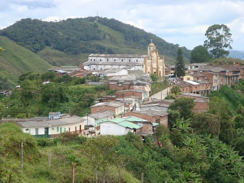 San Pablo Santa Rosa de Osos